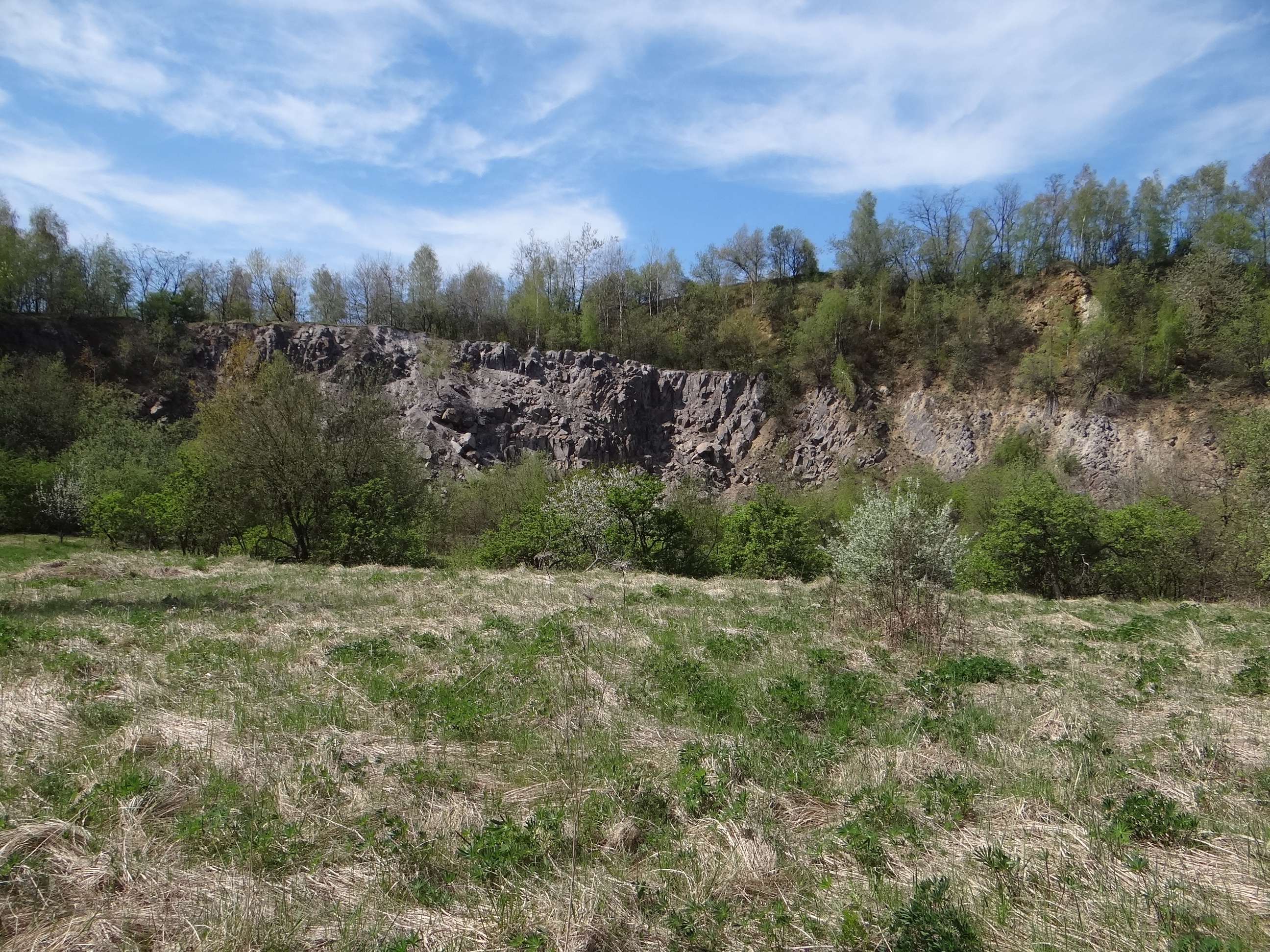 Nieczynny kamieniołom porfiru w Miękini